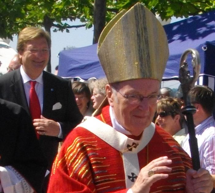 Oberbürgermeister Dirk Elbers und Joachim Kardinal Meisner